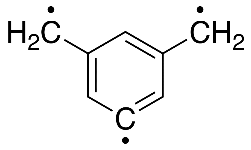 Skeletal structure of 5-dehydro-m-xylylene